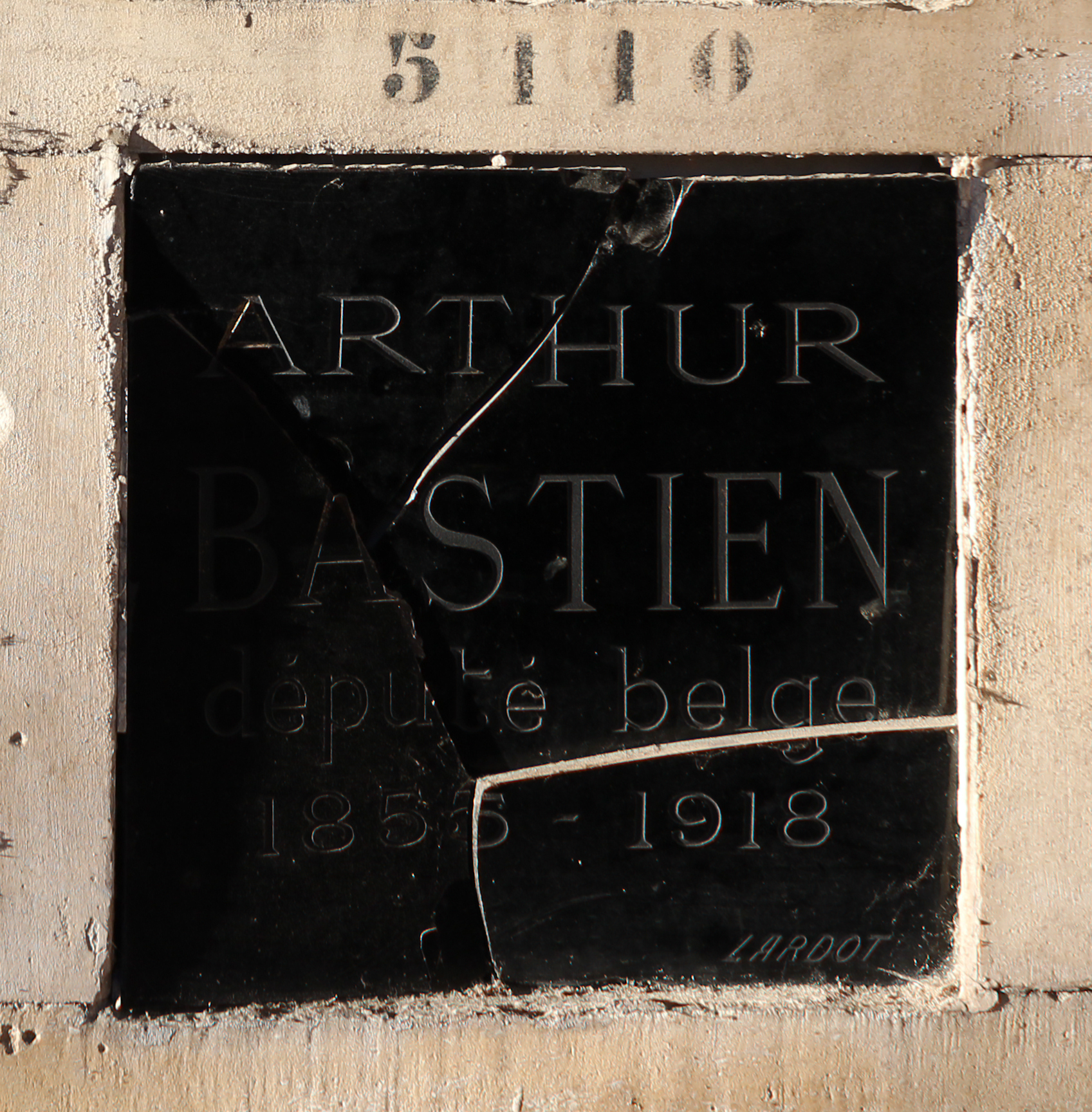 Case n°5110 d'Arthur Bastien (1855-1918) au columbarium du cimetière du Père-Lachaise.